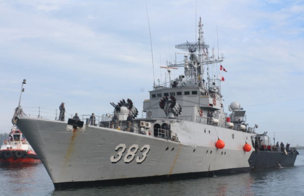 KRI IMAM BONJOL KRI Imam Bonjol yang dipimpin Komandan KRI Imam Bonjol, Mayor Laut (P) Ali Setiandy, Minggu pagi (14/8/2016) tiba di pelabuhan Pulau Baai Provinsi Bengkulu, kedatangan kapal perang anti kapal selam yang membawa kru pasukan dengan 60 personil atas perintah Armabar akan ikut serta dalam kegiatan HUT RI ke 71 di Pulau Enggano.